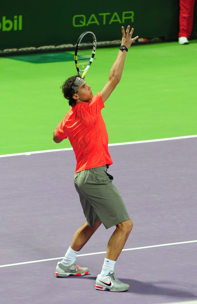 Rafael Nadal